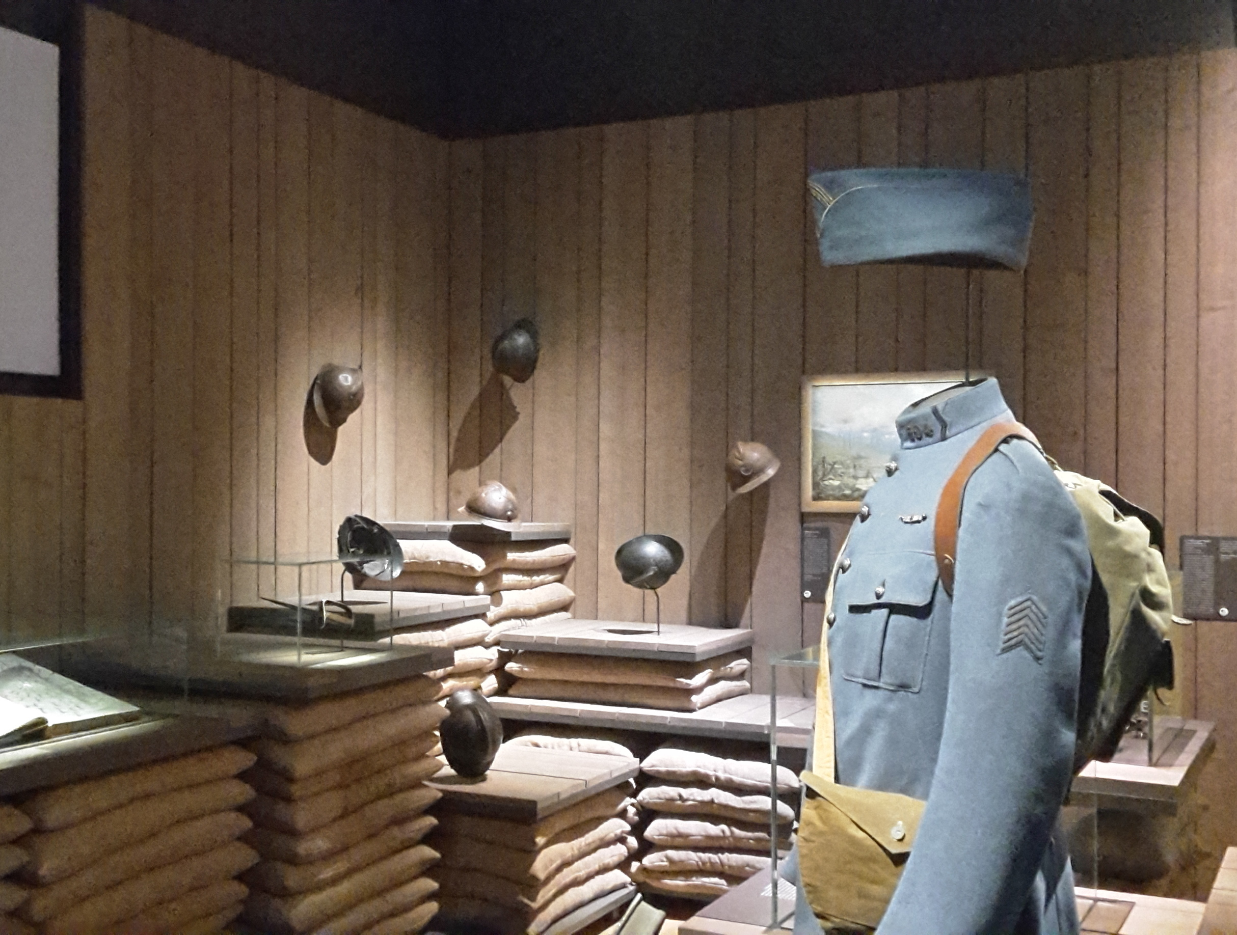 Salle consacrée à la Première Guerre mondiale, au Château des ducs de Bretagne, Nantes.